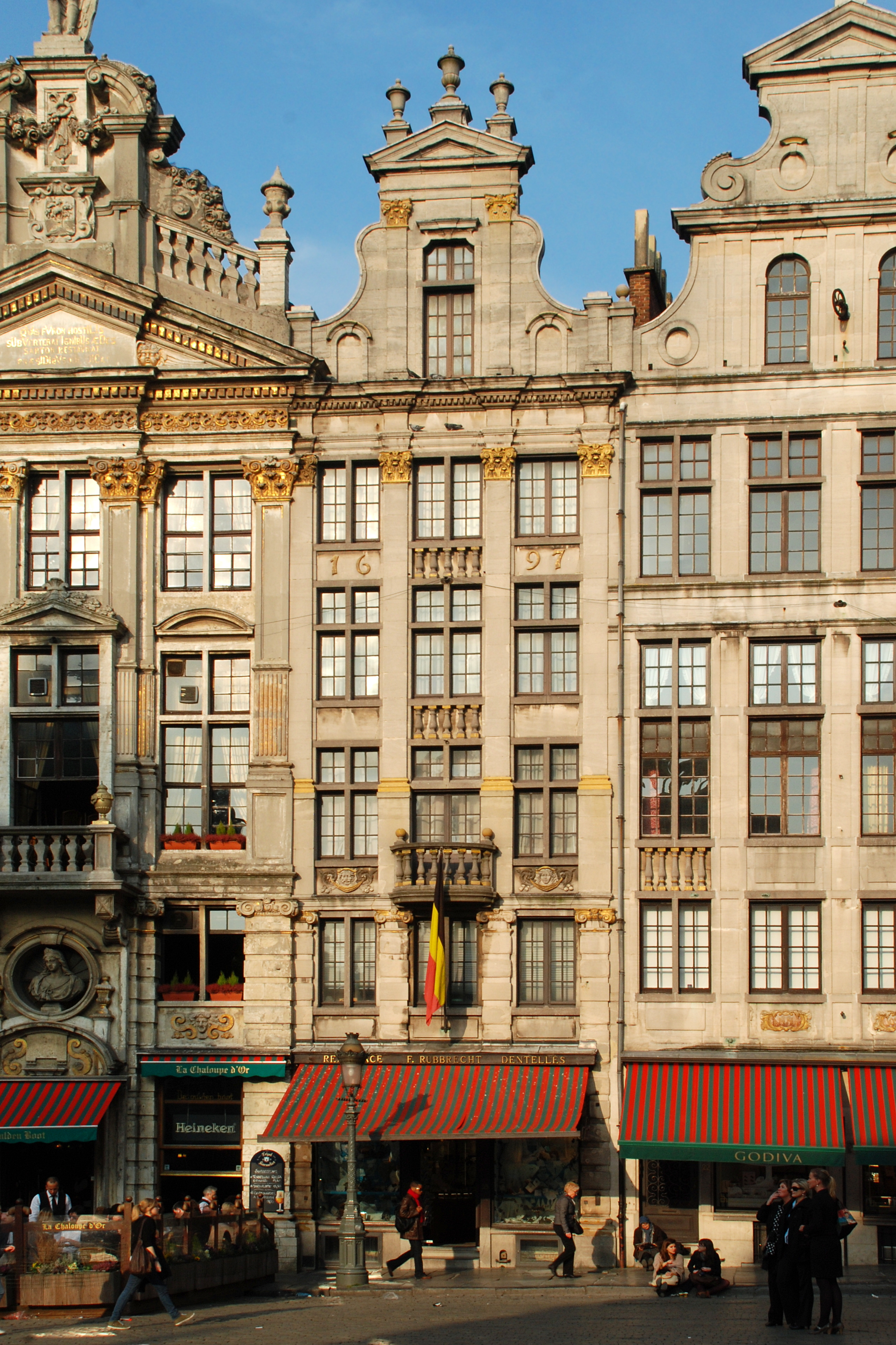 Belgique - Bruxelles - Grand-Place - Maison de l'Ange